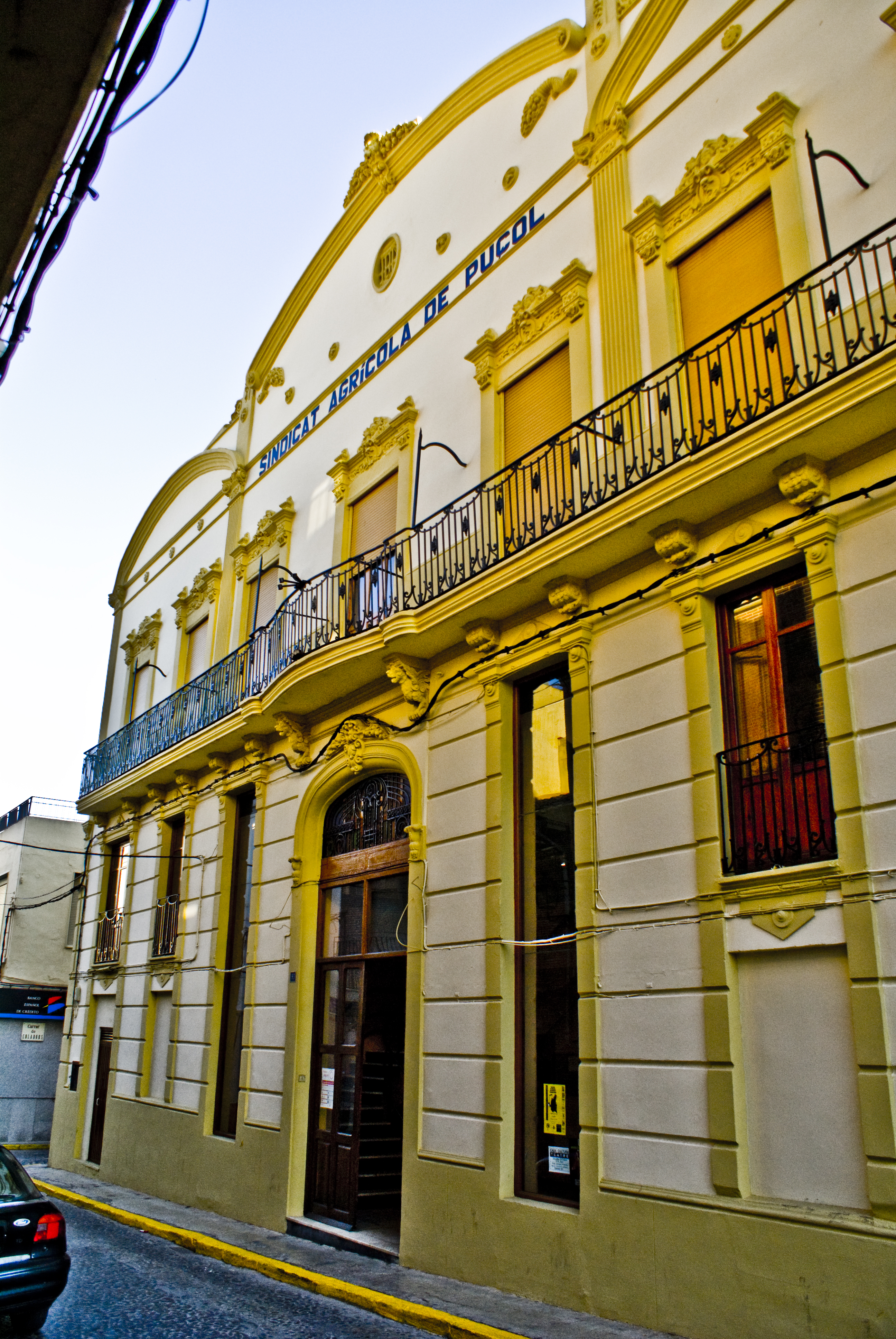 Façana del sindicat agrícola de Puçol. Valencia.